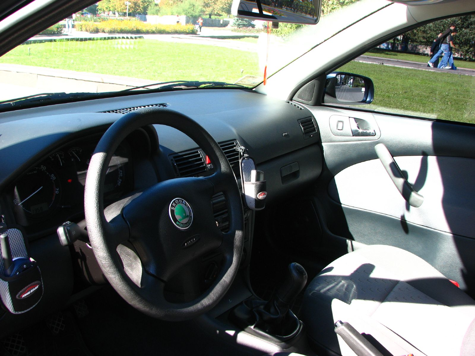 Škoda Octavia I interiorSold